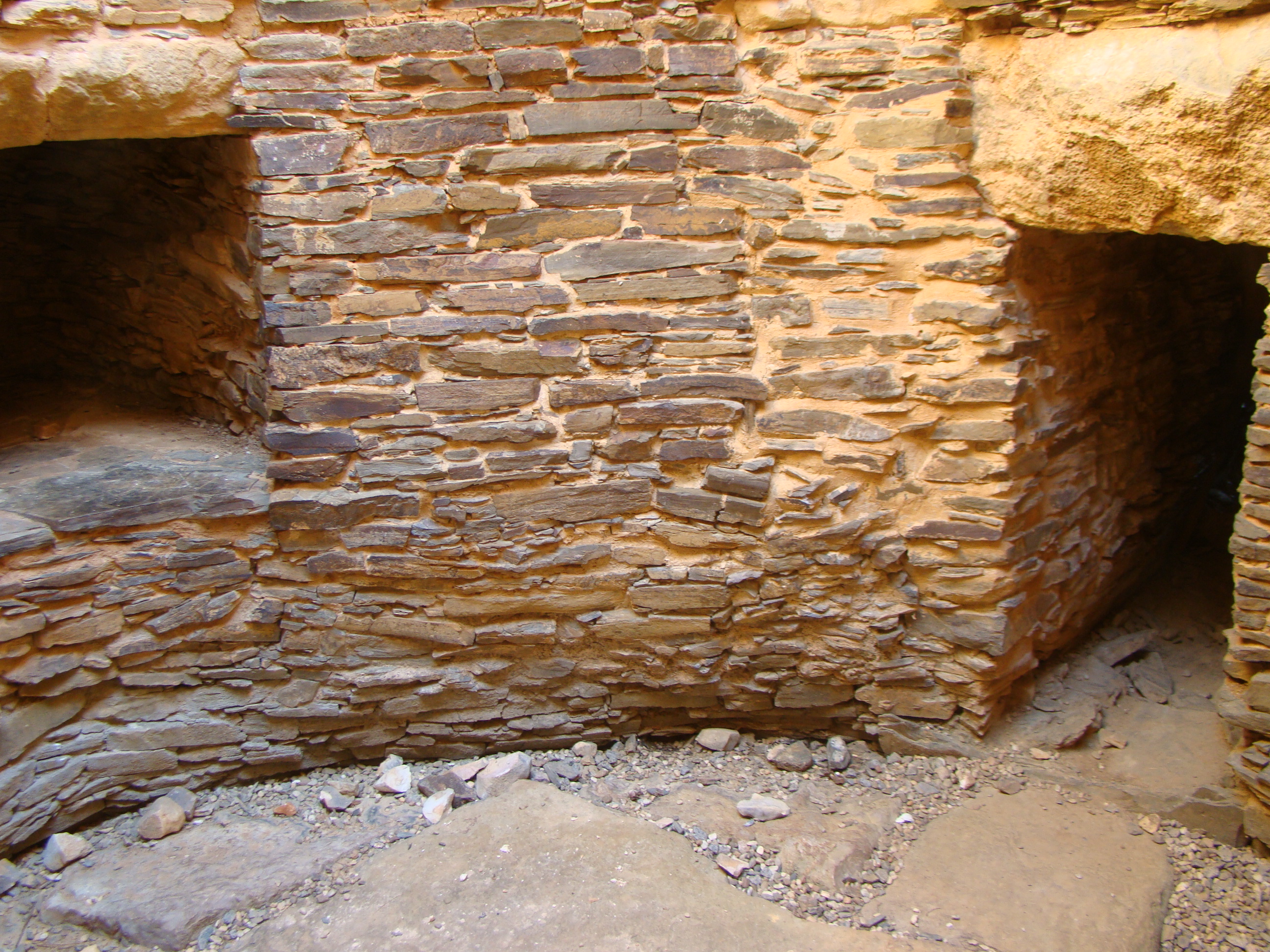 Interior da Necrópole em Alcalar 2017